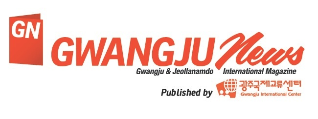 Logotype of Gwangju News